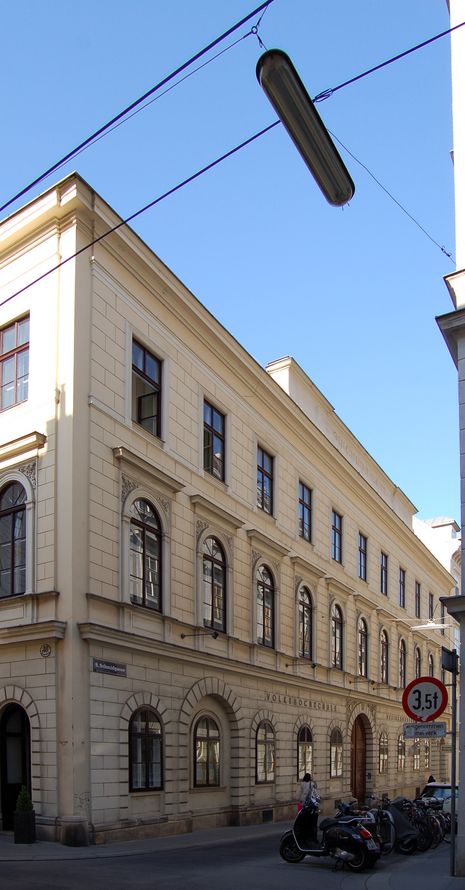 Das denkmalgeschützte Gebäude in der Schmidgasse 18 in Wien-Josefstadt.